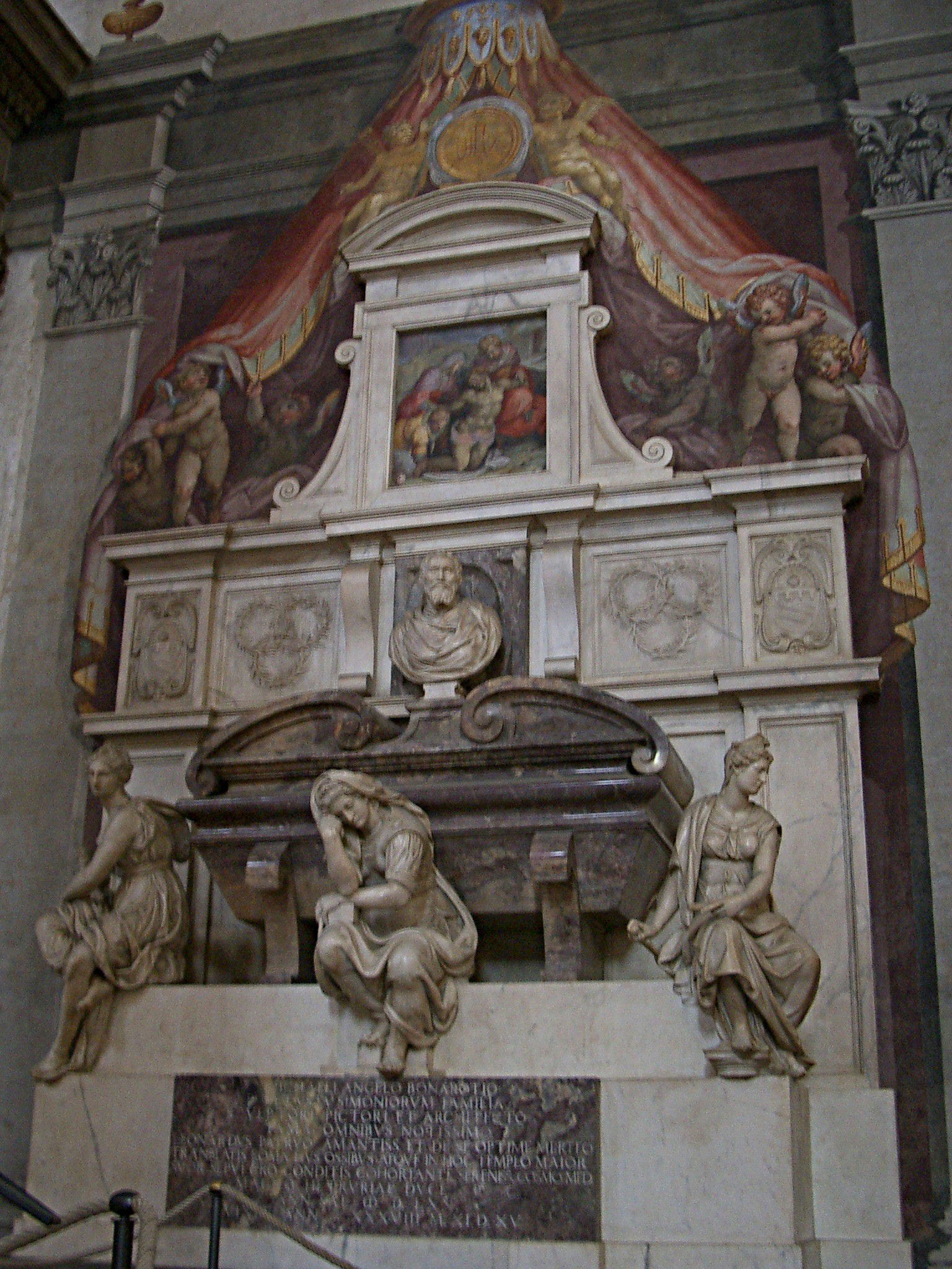 Michelangelo's tomb in Basilica di Santa Croce di Firenze